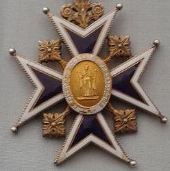 Agrandissement de la photo originale de la croix des chanoines de Versailles